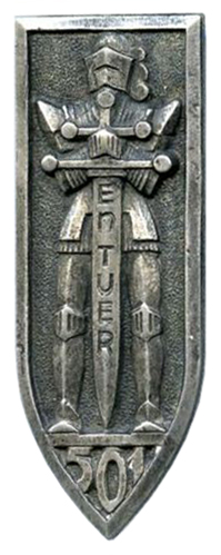 Insigne du 501e régiment de chars de combat - Type 2